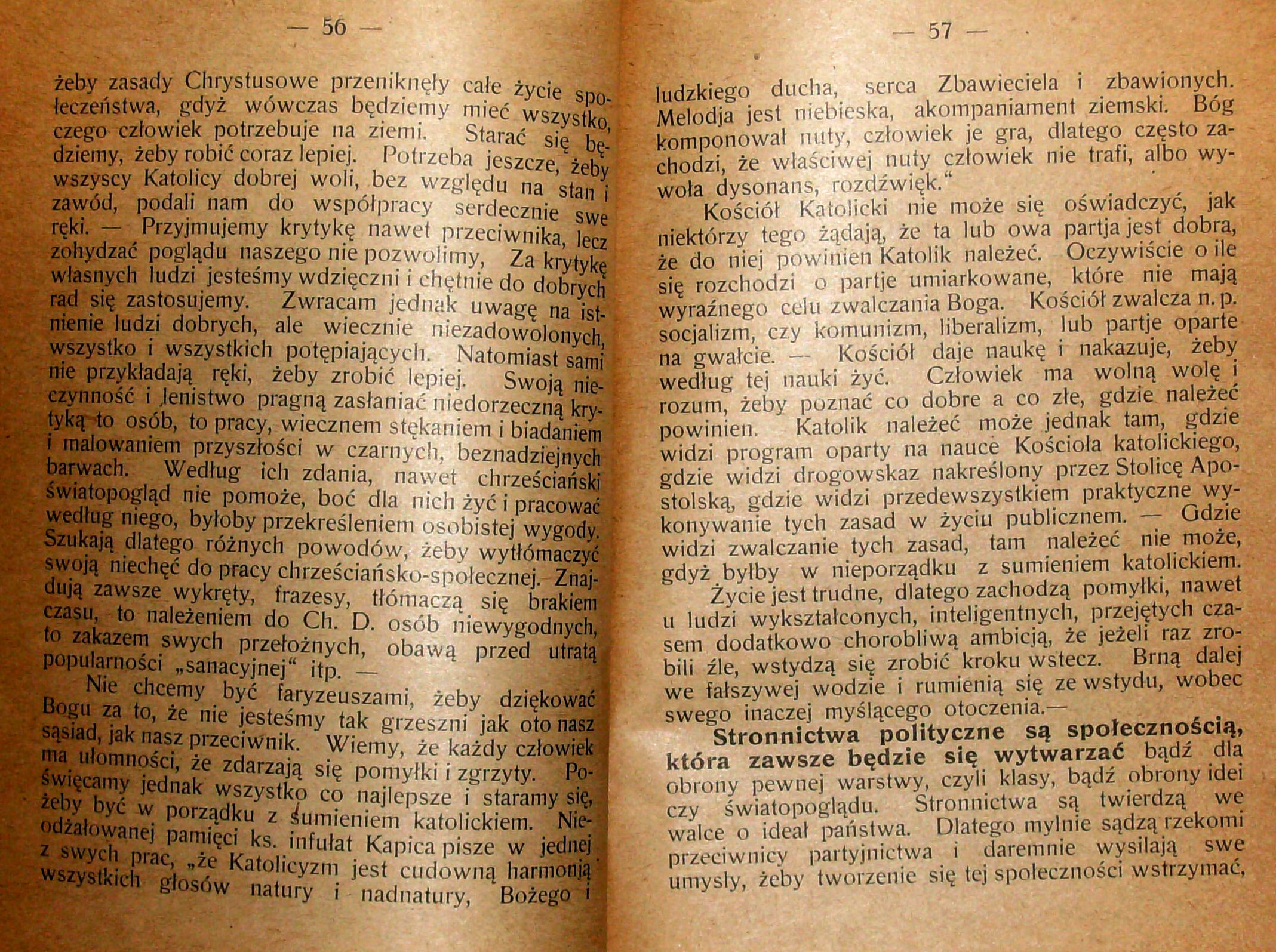 Stanisław Krzyżowski, Rozmyślania w czterdziestą rocznicę encykliki „Rerum novarum”, wydanej 15 maja 1891 r. przez papieża Leona XIII, Pszczyna 1931